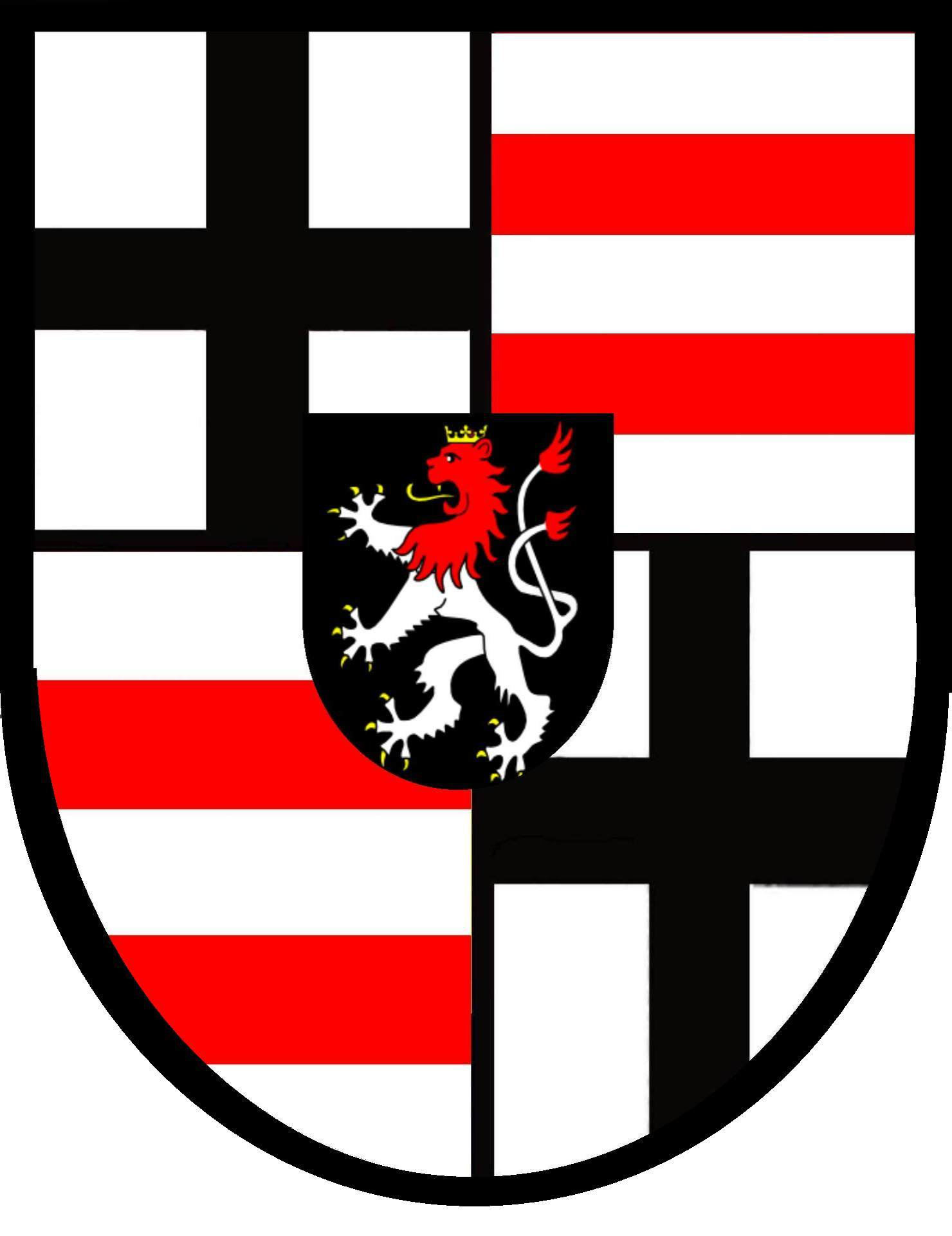 Wappen Adalbert II. von Waldersdorff (1697-1759) Fürstabt und Bischof von Fulda 1757-1759